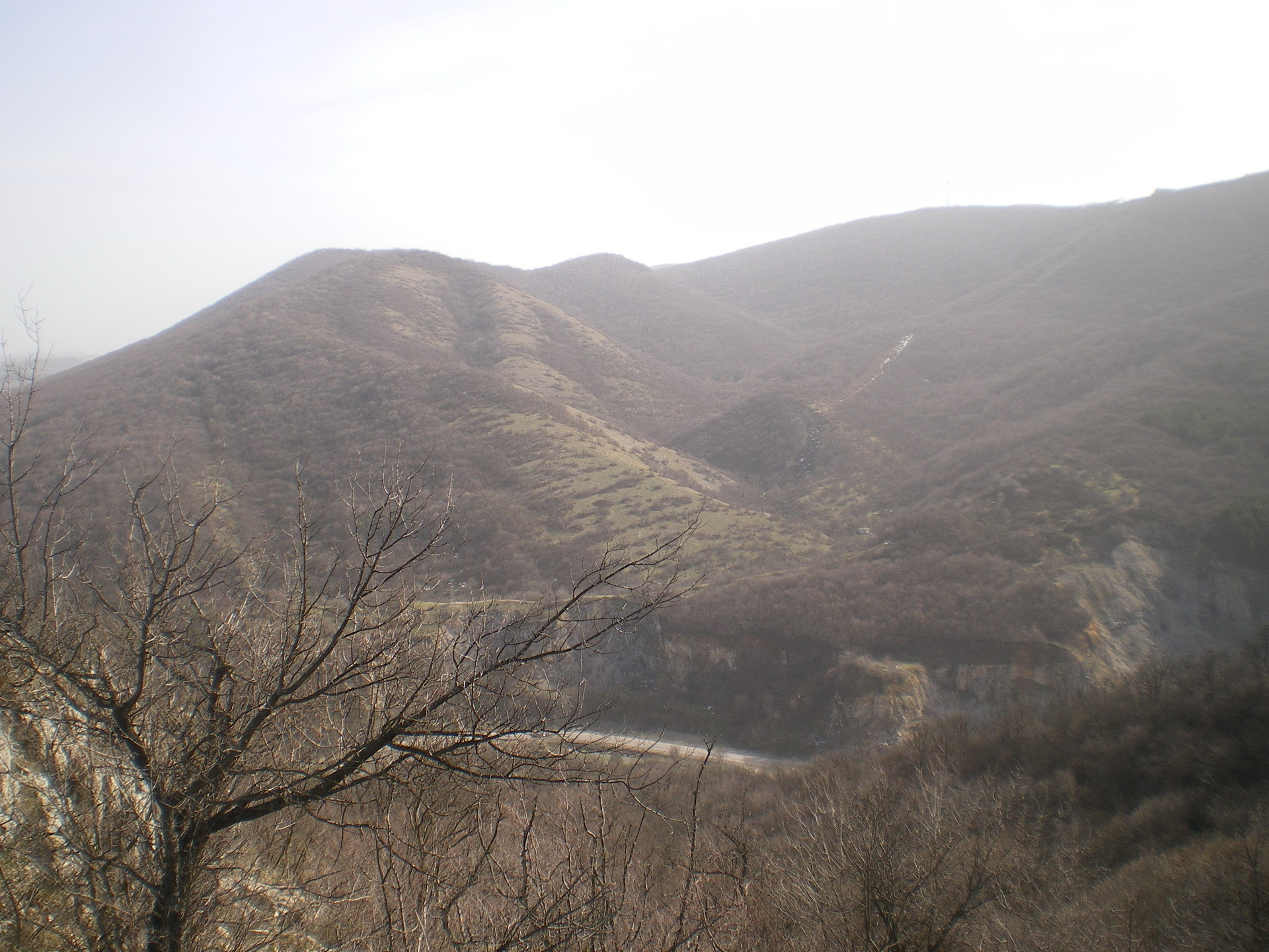 Изглед към Преславската планина и прохода Боаза, горе в дясно се забелязва хижа Младост